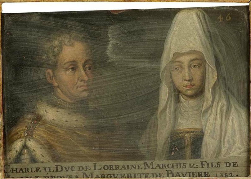 Portrait de Charles II, duc de Lorraine de 1414 à 1431, et de son épouse Marguerite de Bavière. Ce tableau fait partie d'une suite d'une soixantaine de double-portraits représentant les ducs et duchesses de Lorraine ainsi que leurs ancêtres supposés. Musée des Offices, Florence (Inv. 1890, 655)